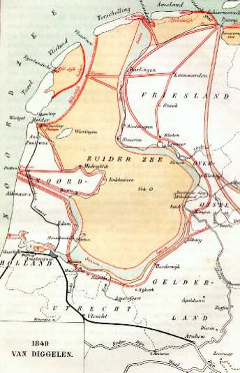 Plan van Diggelen. Auteursrecht verlopen. Herkomst